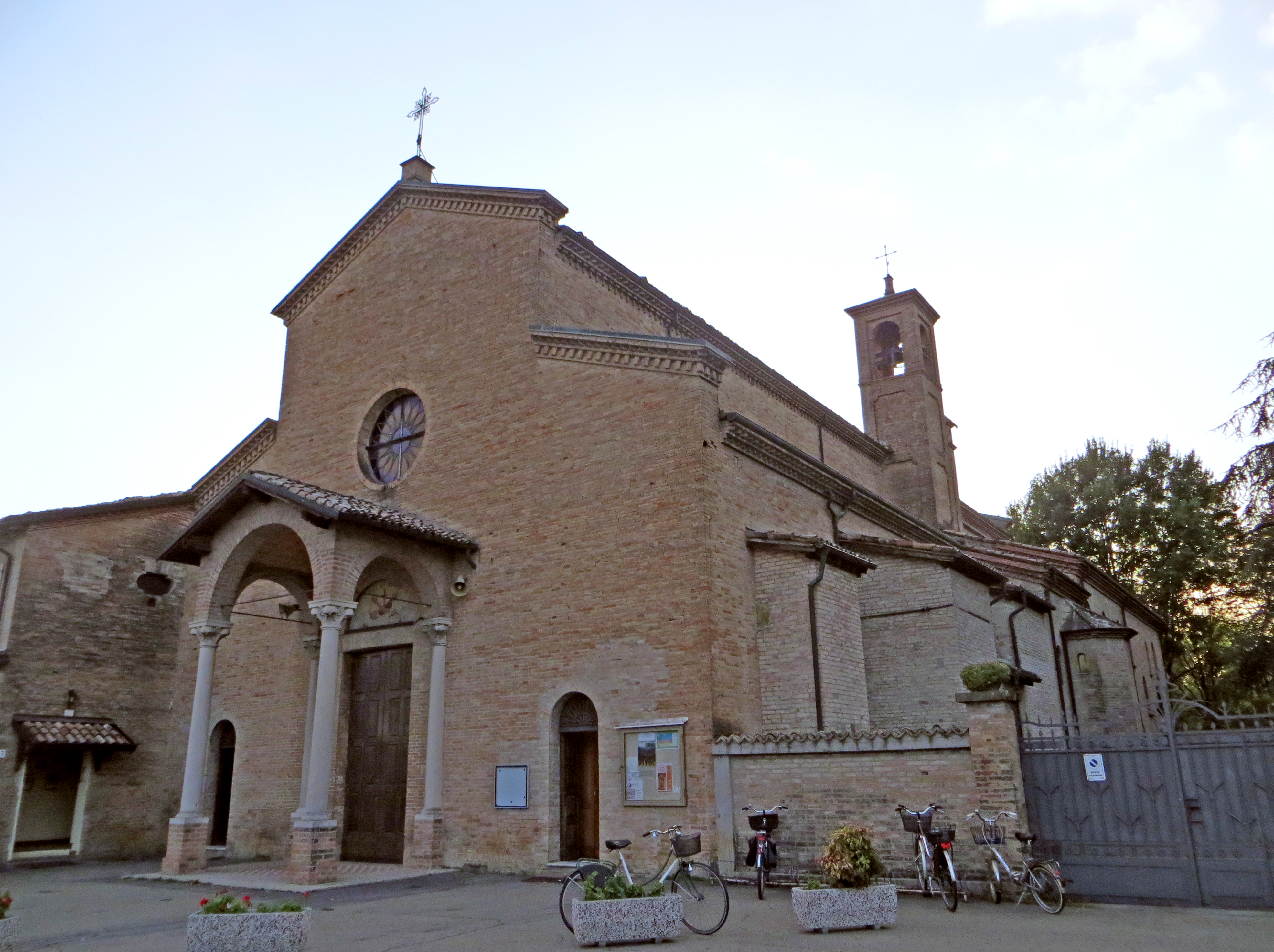 Chiesa del Sacro Cuore (Fidenza) - facciata e lato nord